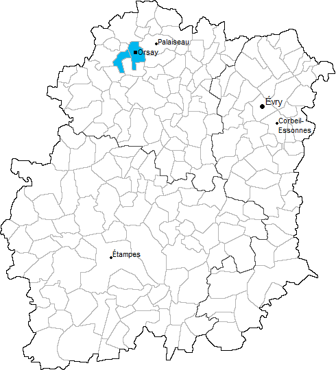 Carte de situation du canton d'Orsay dans le département de l'Essonne (91)